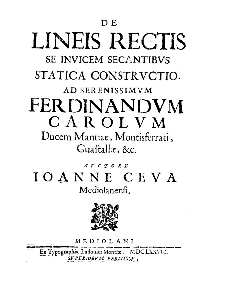 De lineis rectis se inuicem secantibus statica constructio. Ad serenissimum Ferdinandum Carolum ducem Mantuae, ... Auctore Ioanne Ceua Mediolanensi. - Mediolani : ex typographia Ludouici Montiae, 1678 (Mediolani : ex typographia Ludouici Montiae, 1678). - [8], 83, [1] p., X c. di tav. ripieg. : ill. ; 4º .